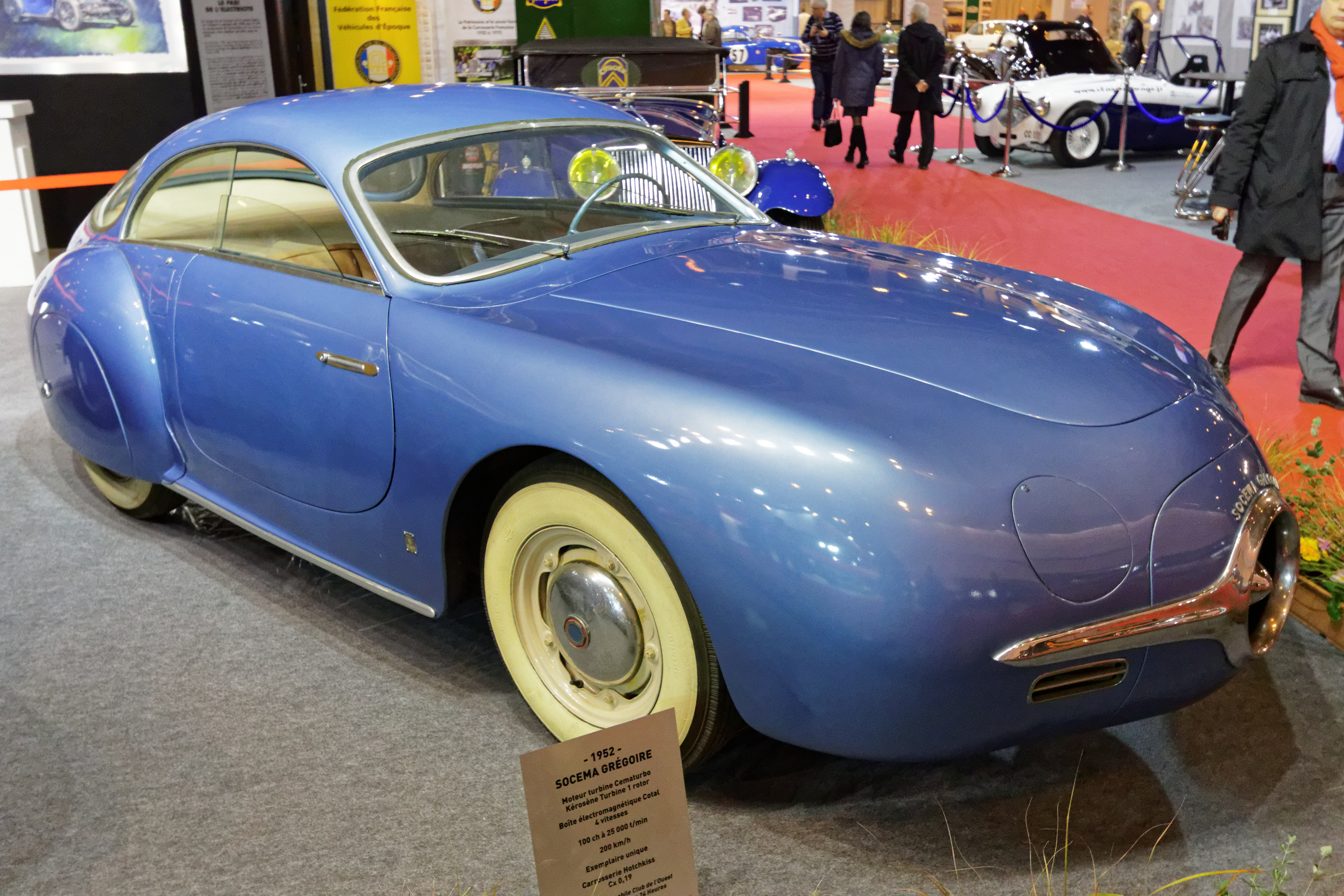 Une des voiture présentée lors du salon Rétromobile de Paris 2015